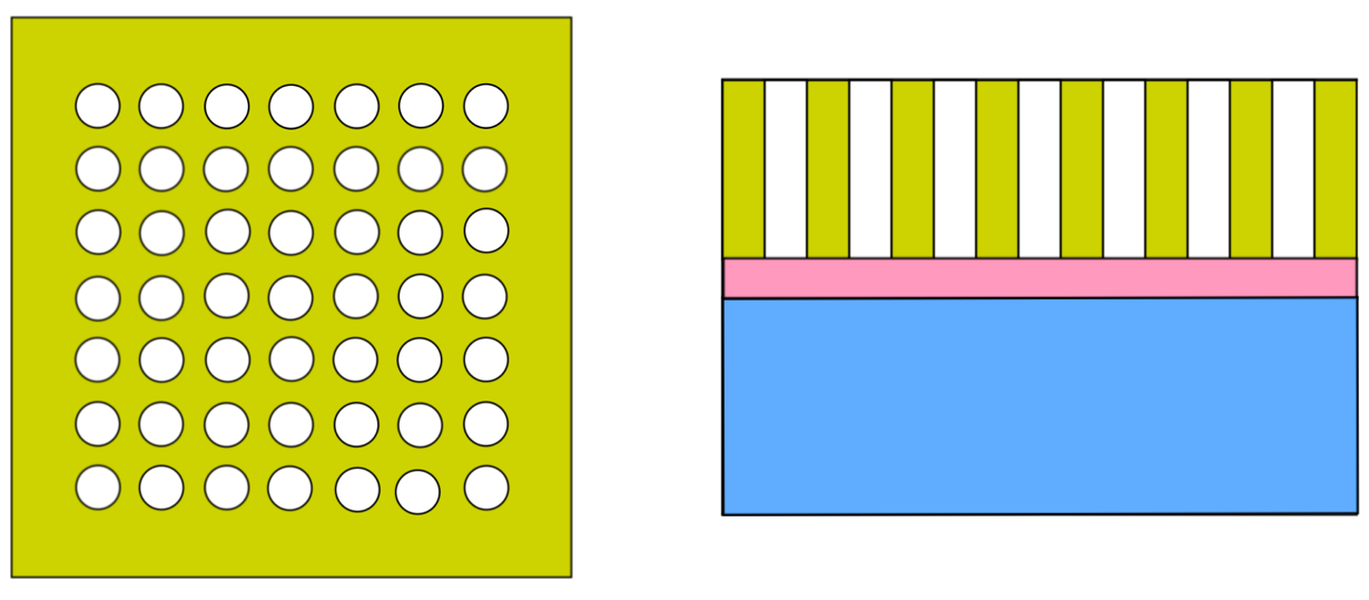 In figura a sinistra si vede una vista dall'alto di un pattern di nanohole, in figura a destra invece una loro vista in sezione, nella quale si possono vedere i vari strati. Partendo dal basso si ha, in ordine: il vetro, lo strato di adesivo, un film metallico (oro) sottile, nel quale è presente il pattern di nanohole.